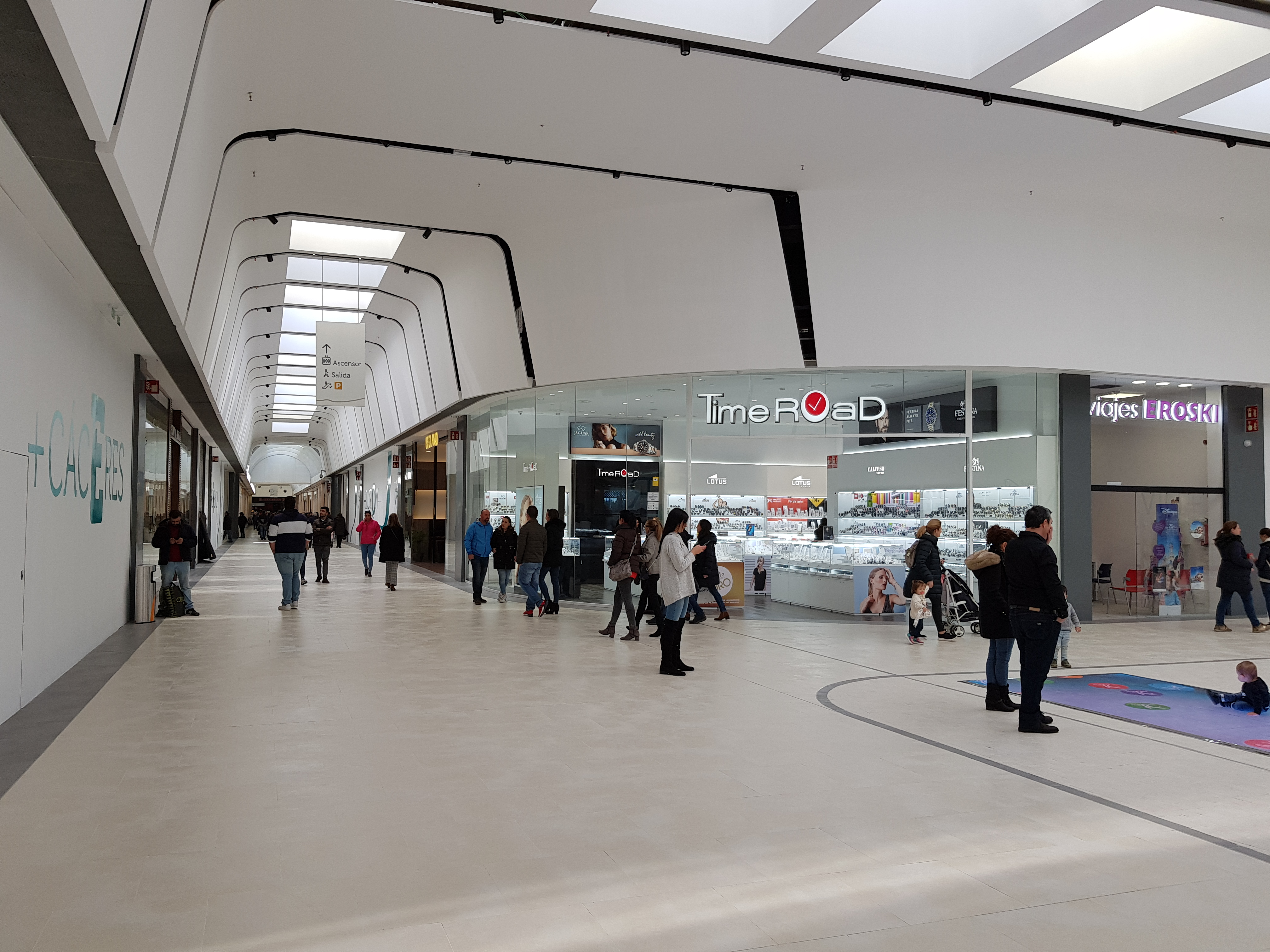 Interior del centro comercial Ruta de la Plata tras la ampliación